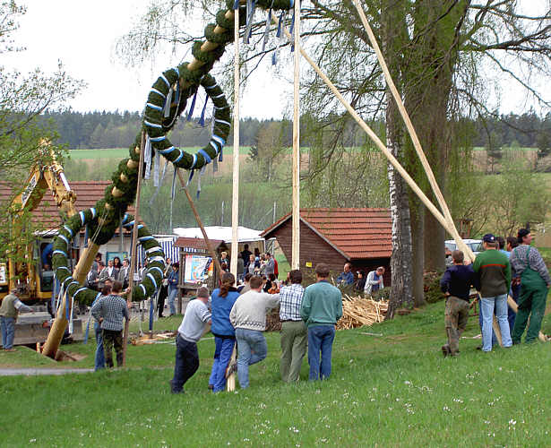 Maibaum in der Ortschaft Pfaffenreuth (Oberpfalz) Copyright Status: GNU Freie Dokumentationslizenz